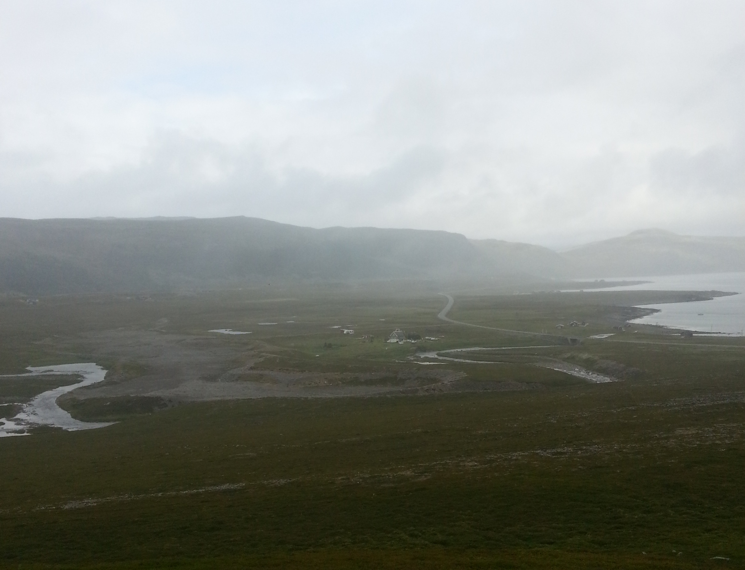 Bilde av Stranda, tatt fra Juovvavárri.